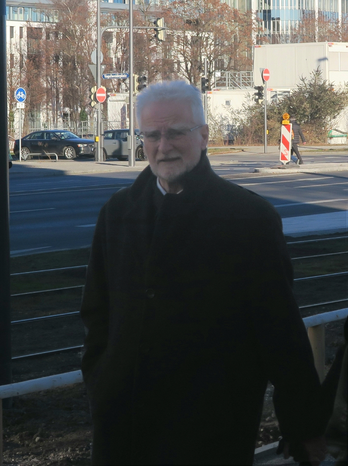 Herbert König, 2001-2016 Vorsitzender der Münchner Verkehrsgesellschaft